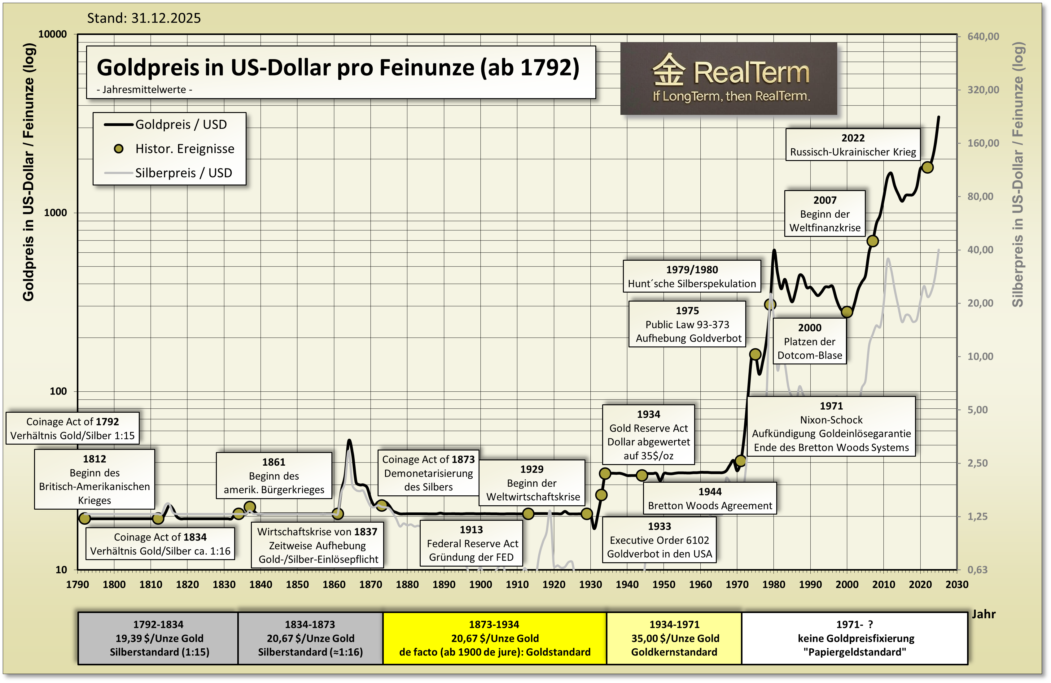 Historischer Goldpreis in US-Dollar (US$) ab 1792